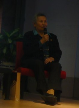 指挥家郑小瑛在厦门大学